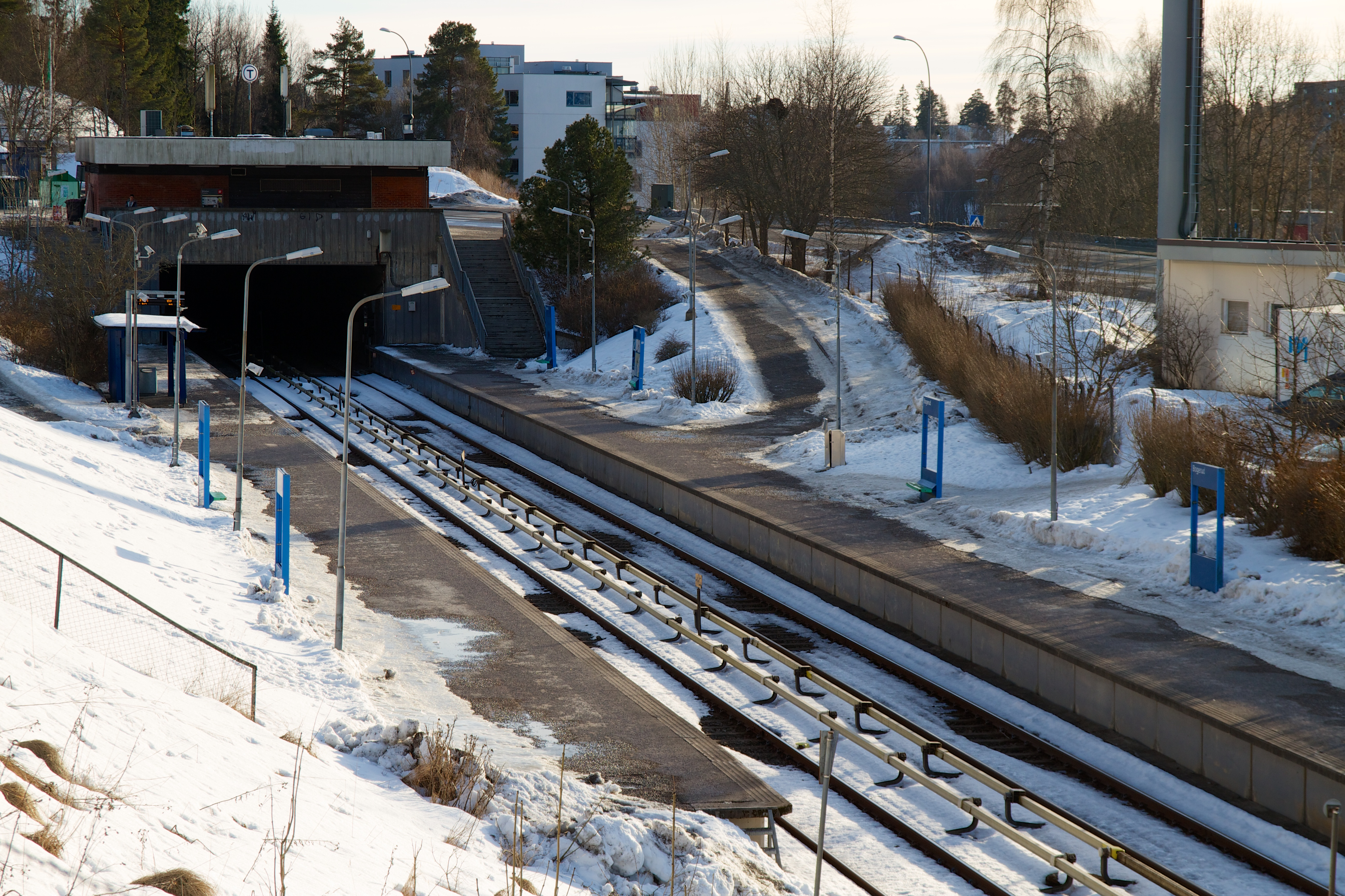 Bogerud stasjon i Oslo.